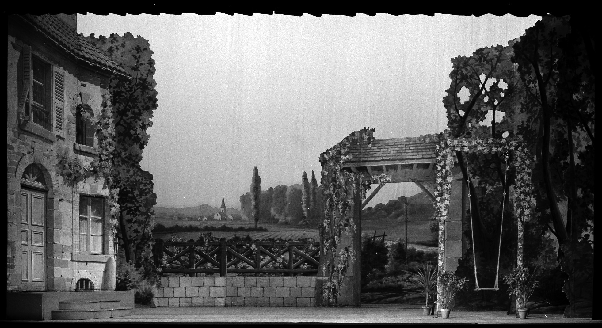 Théâtre du Capitole. Le 26 Avril 1968. Vue du décor de Véronique au théâtre du Capitole.